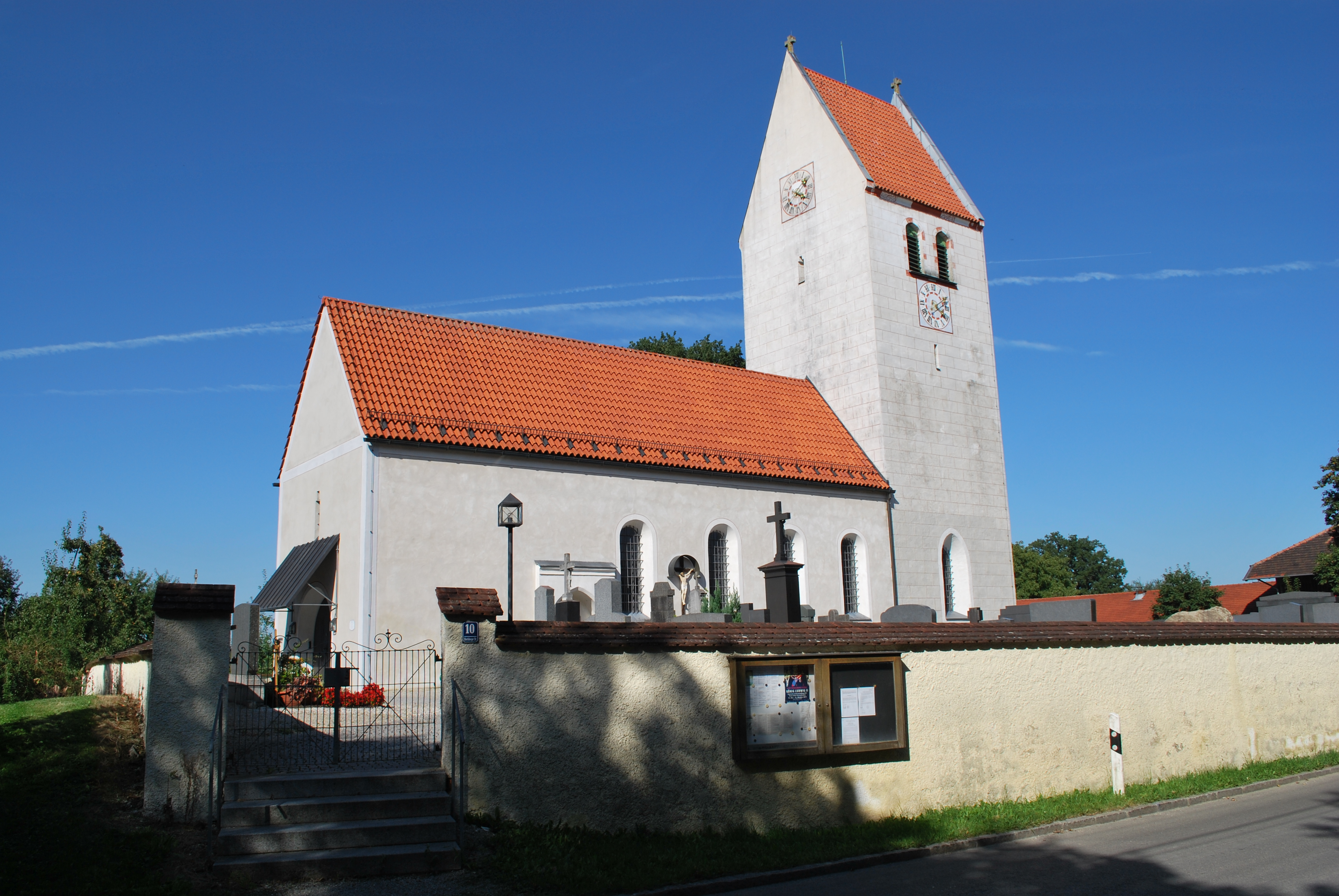 Katholische Kirche, Oberbiberger Str. 10 in Sauerlach, Ortsteil Altkirchen